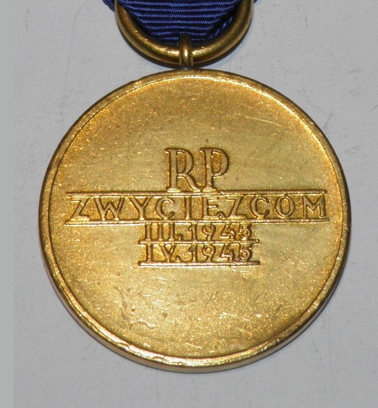 Medal za Odrę Nysę Bałtyk rewers